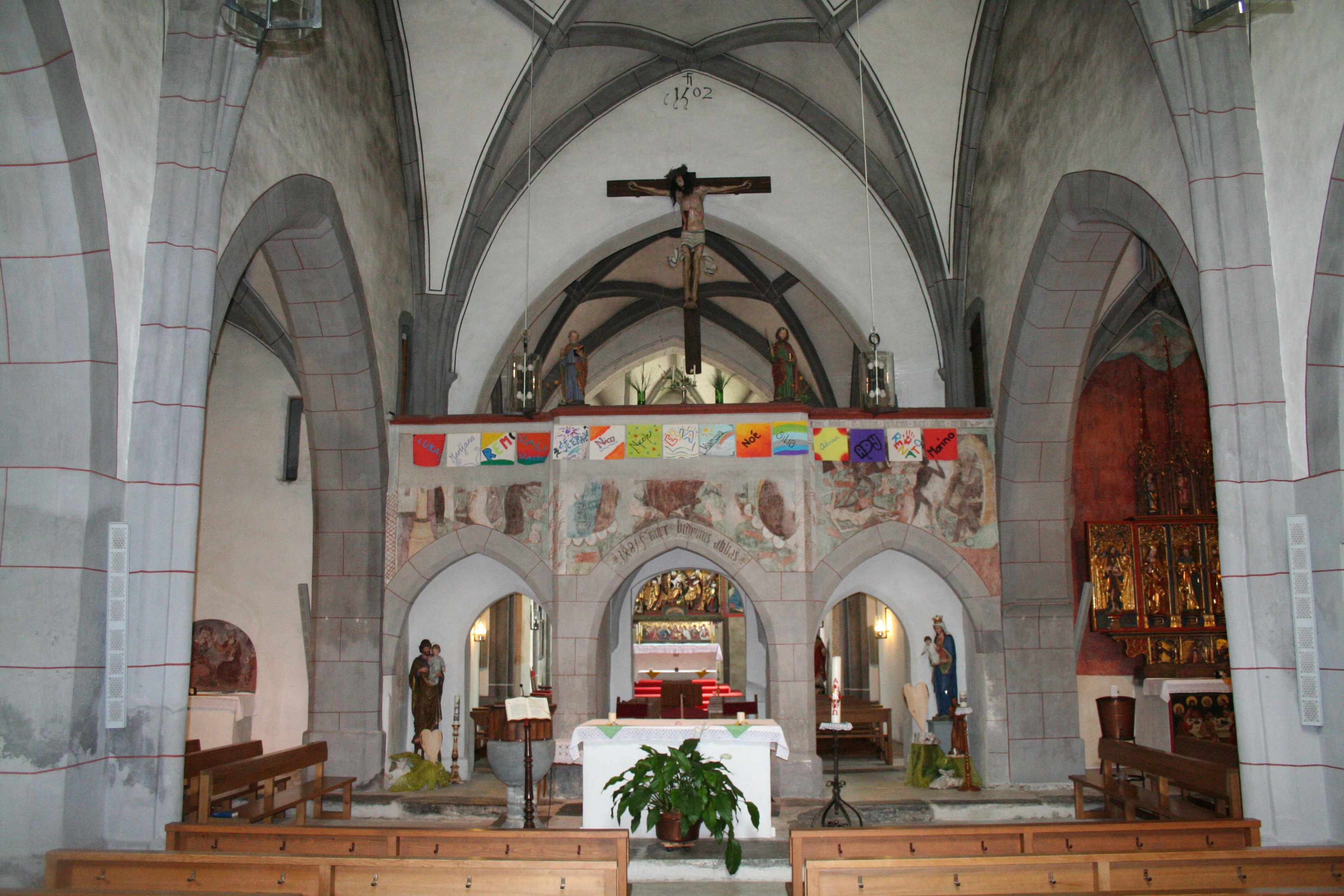 Kirche St. Maria und Michael in Churwalden, Innenraum